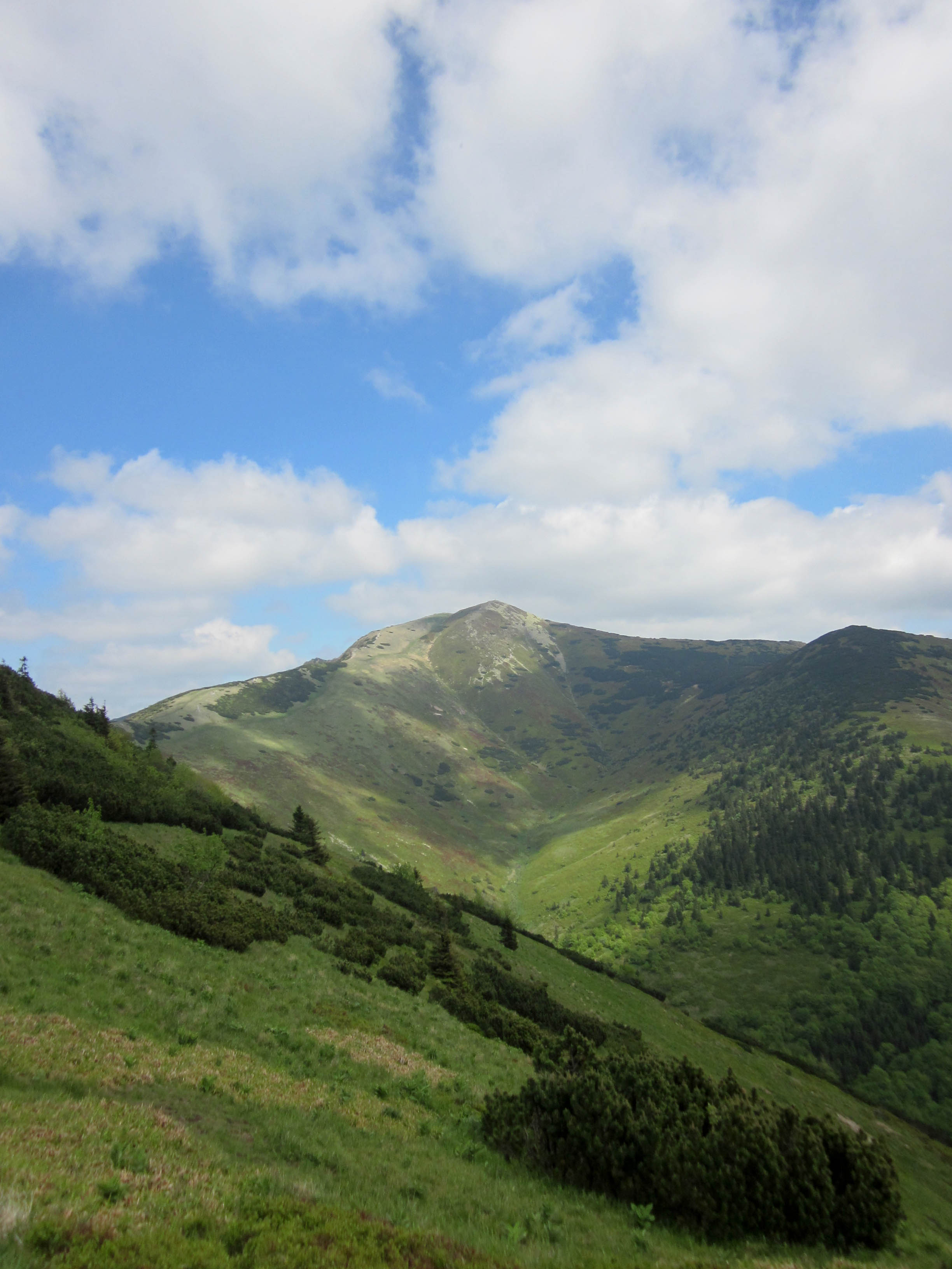 Pohľad na Malý Kriváň zo západu